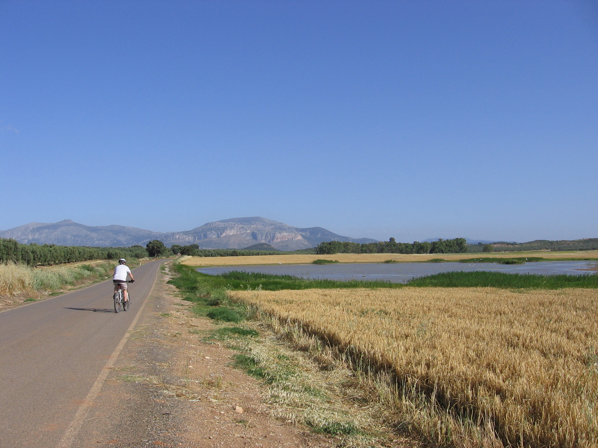 Laguna en Campillos